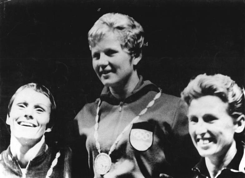 Zentralbild-AP Tre-Fr 2.9.1960 XVII. Olympische Sommerspiele 1960 in Rom. UBz.Siegerehrung im Turmspringen der Damen: Von links: Pope (USA) (Silber), Krämer (Gold) (DDR) und Krutov (UdSSR) (Bronze).